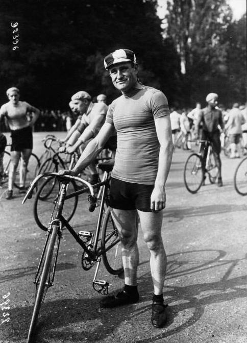 Charles Deruyter - Critérium des As 1921.Bibliothèque nationale de France